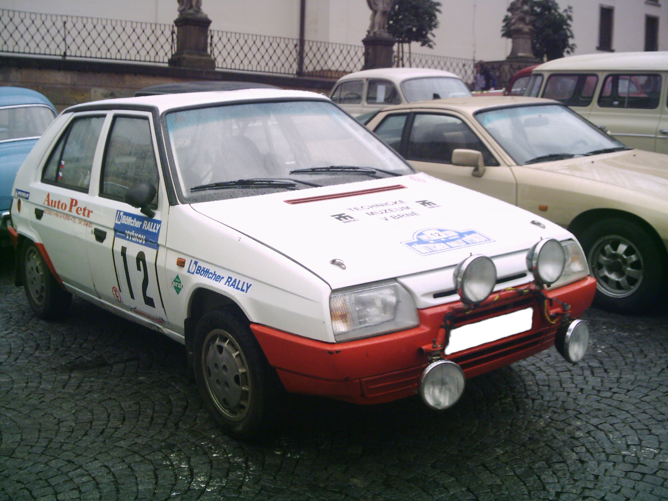 Škoda Favorit - rally prepared